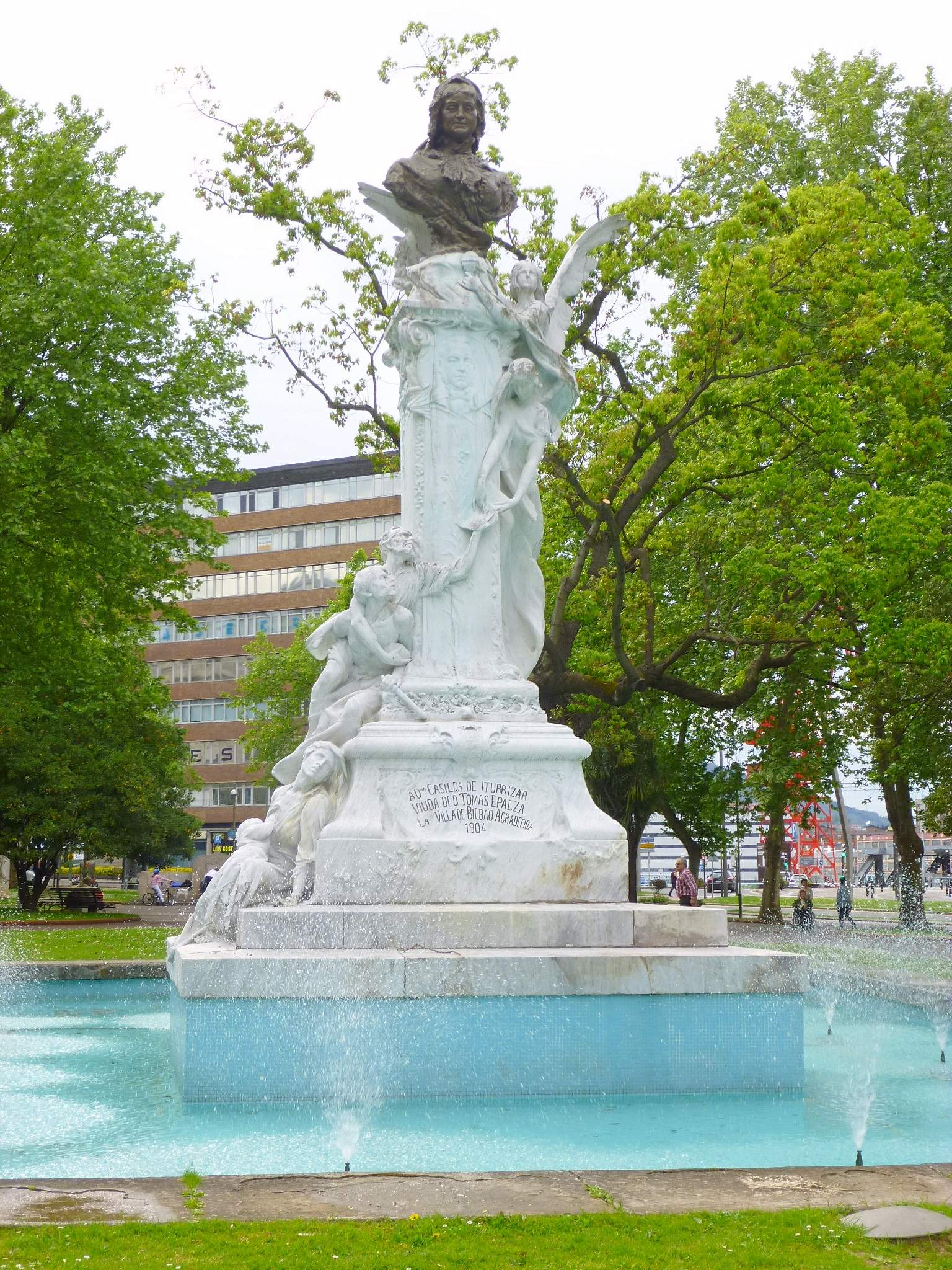 Parque de Doña Casilda Iturrízar (Bilbao)